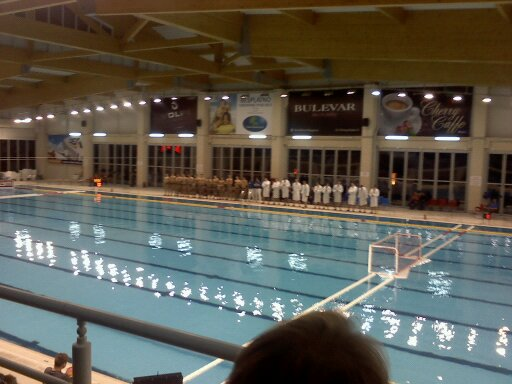 Srpski (latinica): Utakmica 9. kola Prve A lige Srbije u vaterpolu